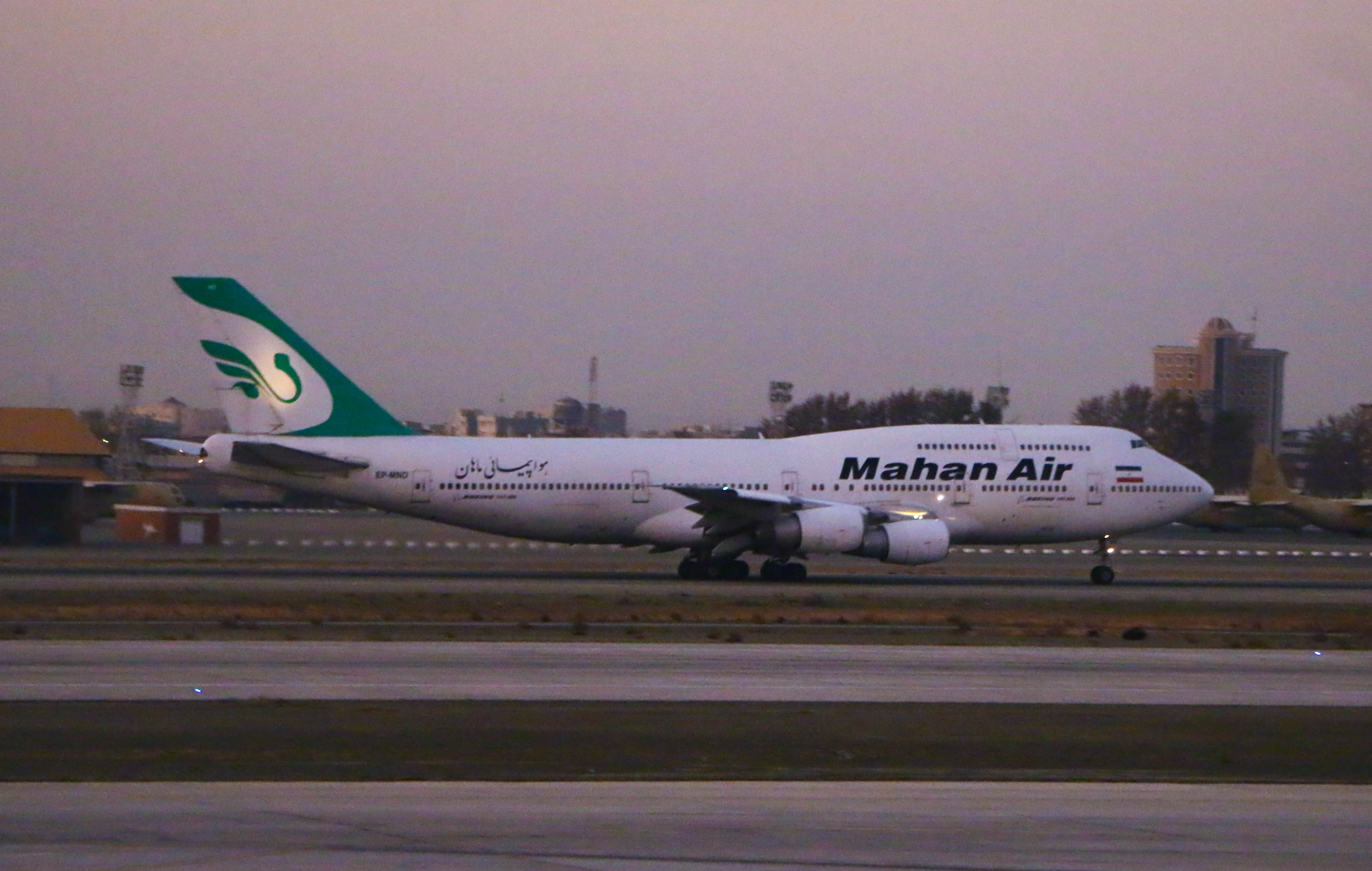 بویینگ ۷۴۷ ماهان با رجیستر EP-MND